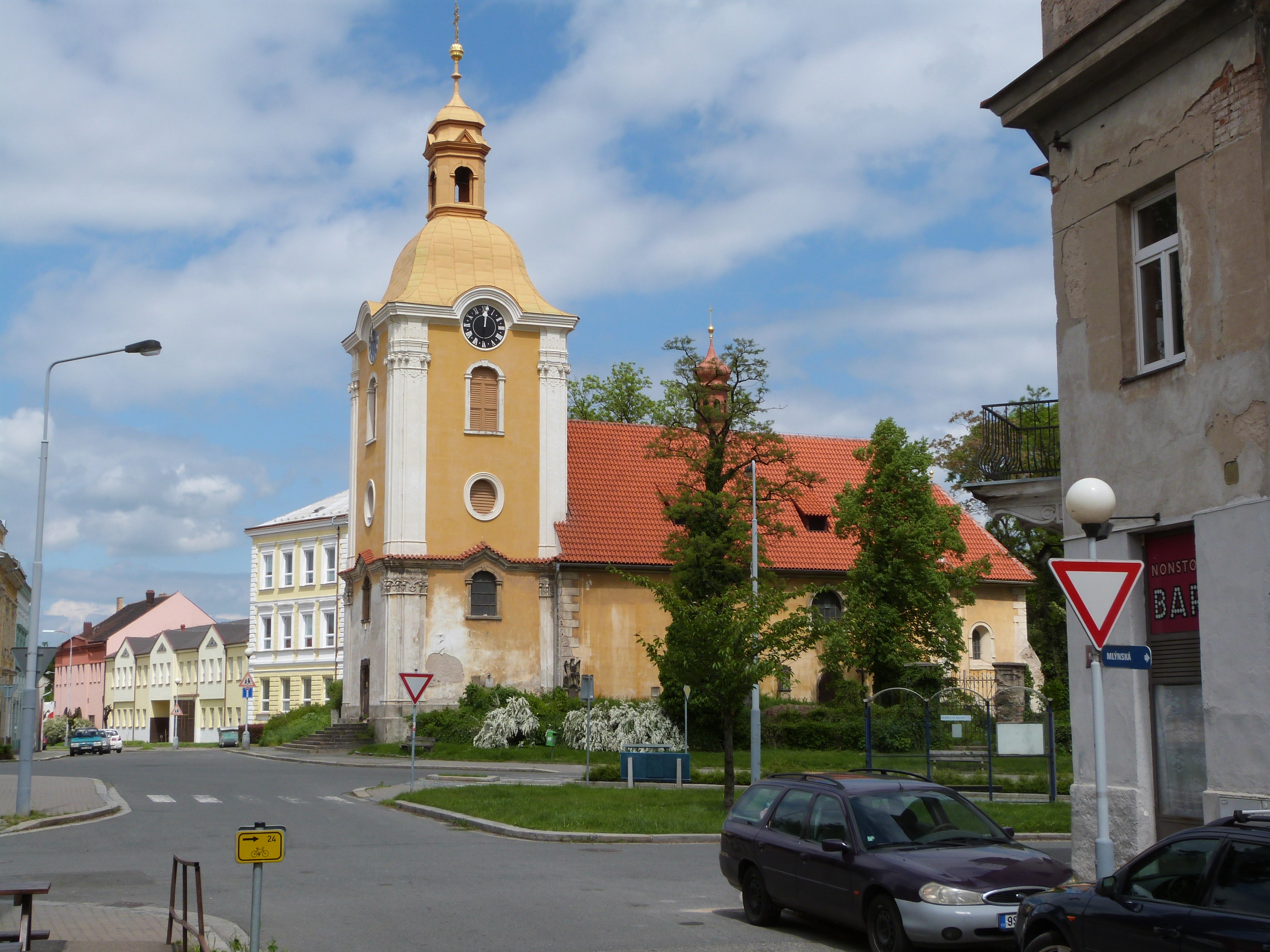 Kostel sv. Víta v Kolíně